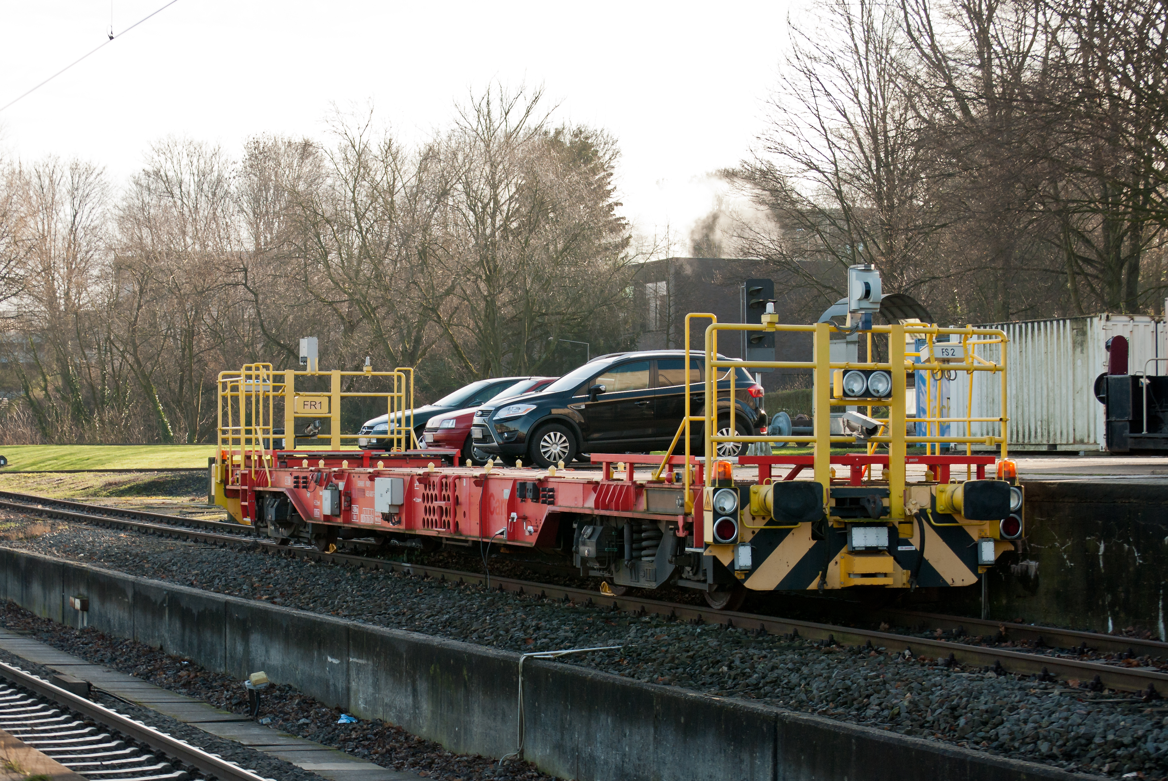 Cargomoverprototyp am Institut für Schienenfahrzeugtechnik der RWTH Aachen